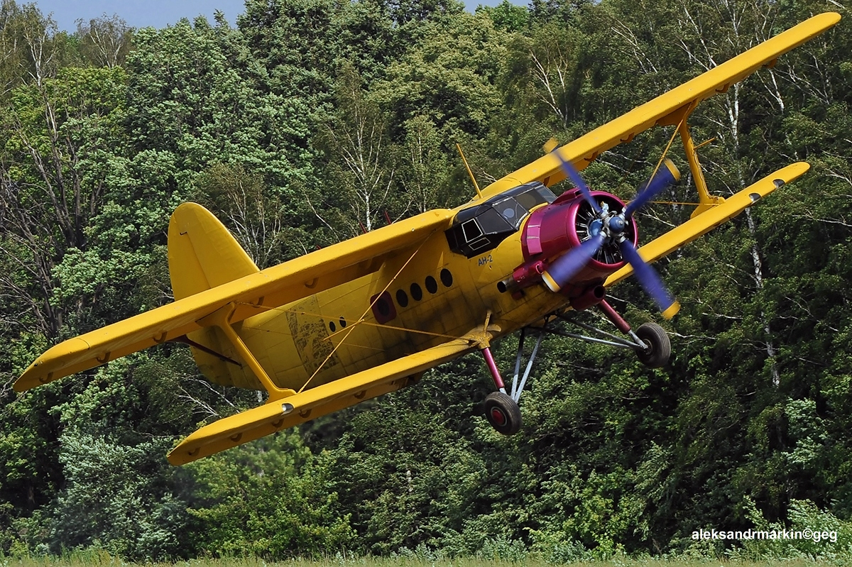 Flight An-2